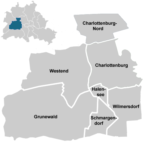 Ortsteile des Bezirks Charlottenburg-Wilmersdorf von Berlin